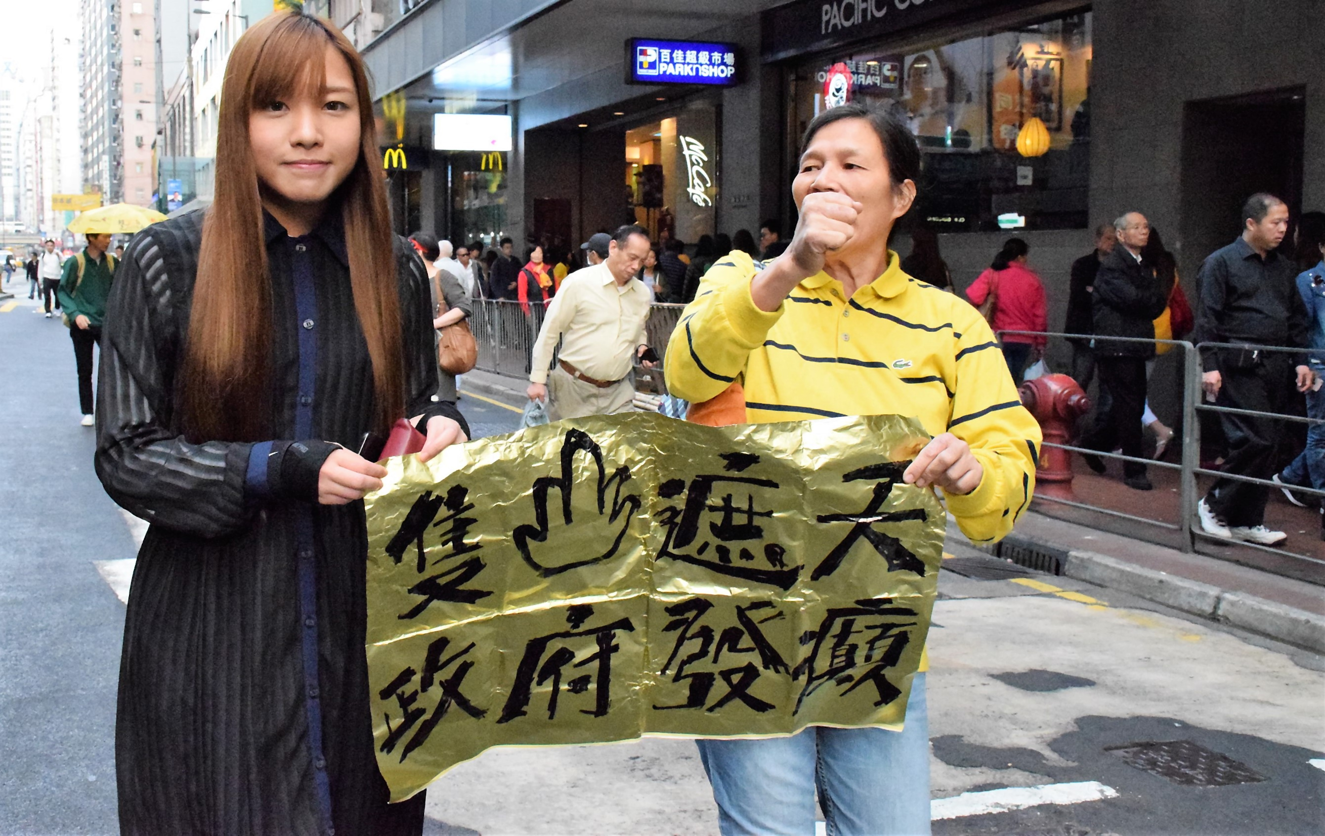 游蕙禎參與2017年元旦遊行